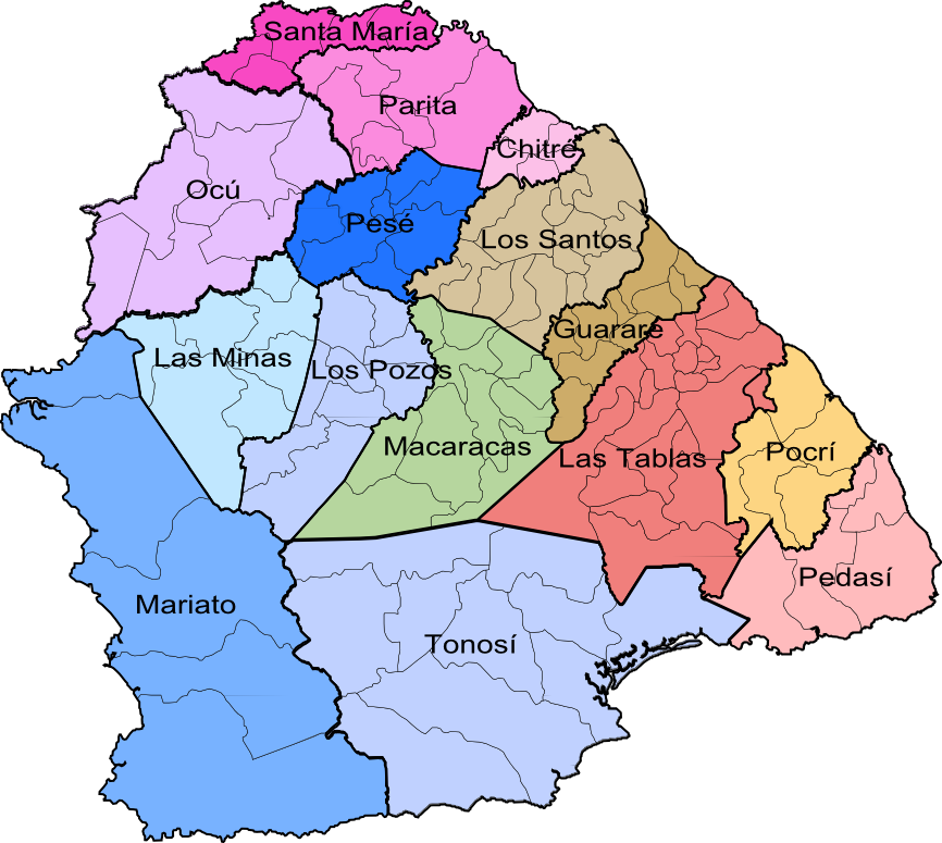 Distritos considerados históricamente como parte de Azuero.